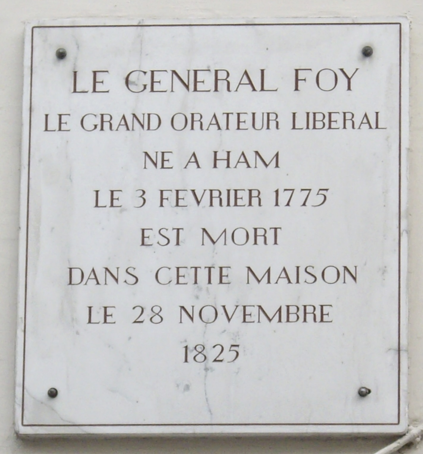 Plaque commémorative, 62 rue de la Chaussée-d'Antin, Paris 9e. « Le général Foy, le grand orateur libéral, né à Ham le 3 février 1775, est mort dans cette maison le 28 novembre 1825. »